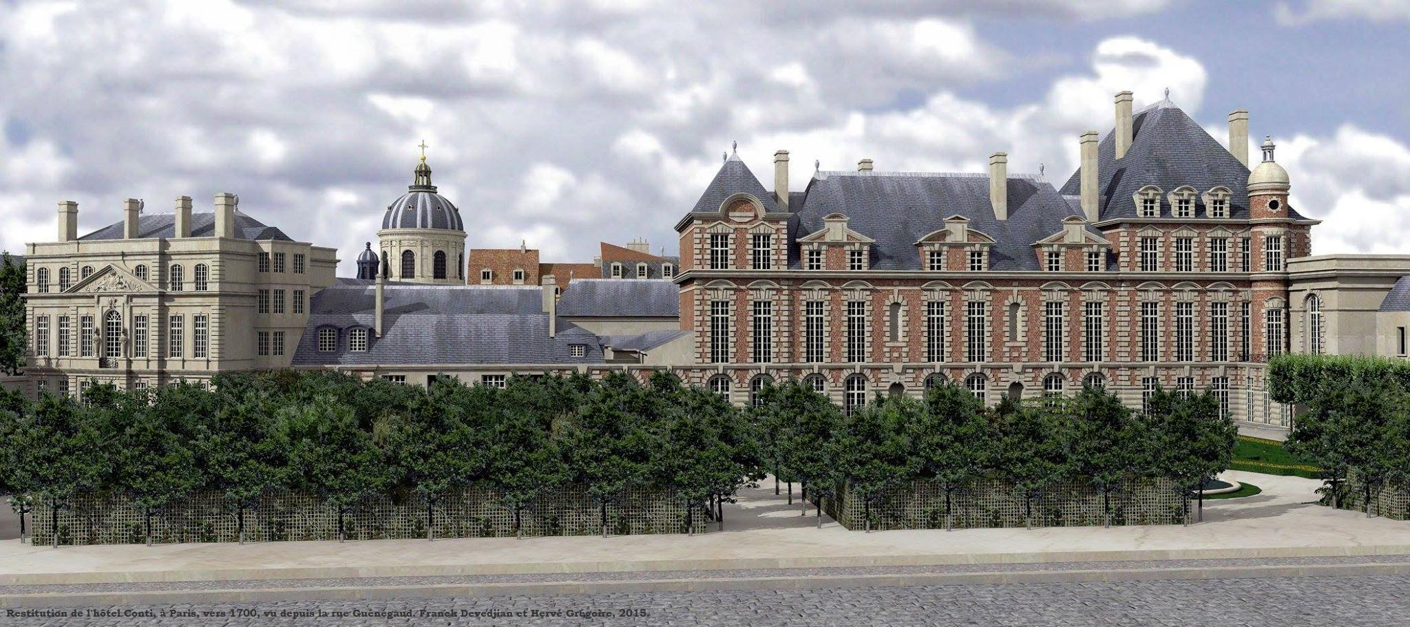 Restitution 3D de la façade sur jardin de l'hôtel de Conti vers 1700.